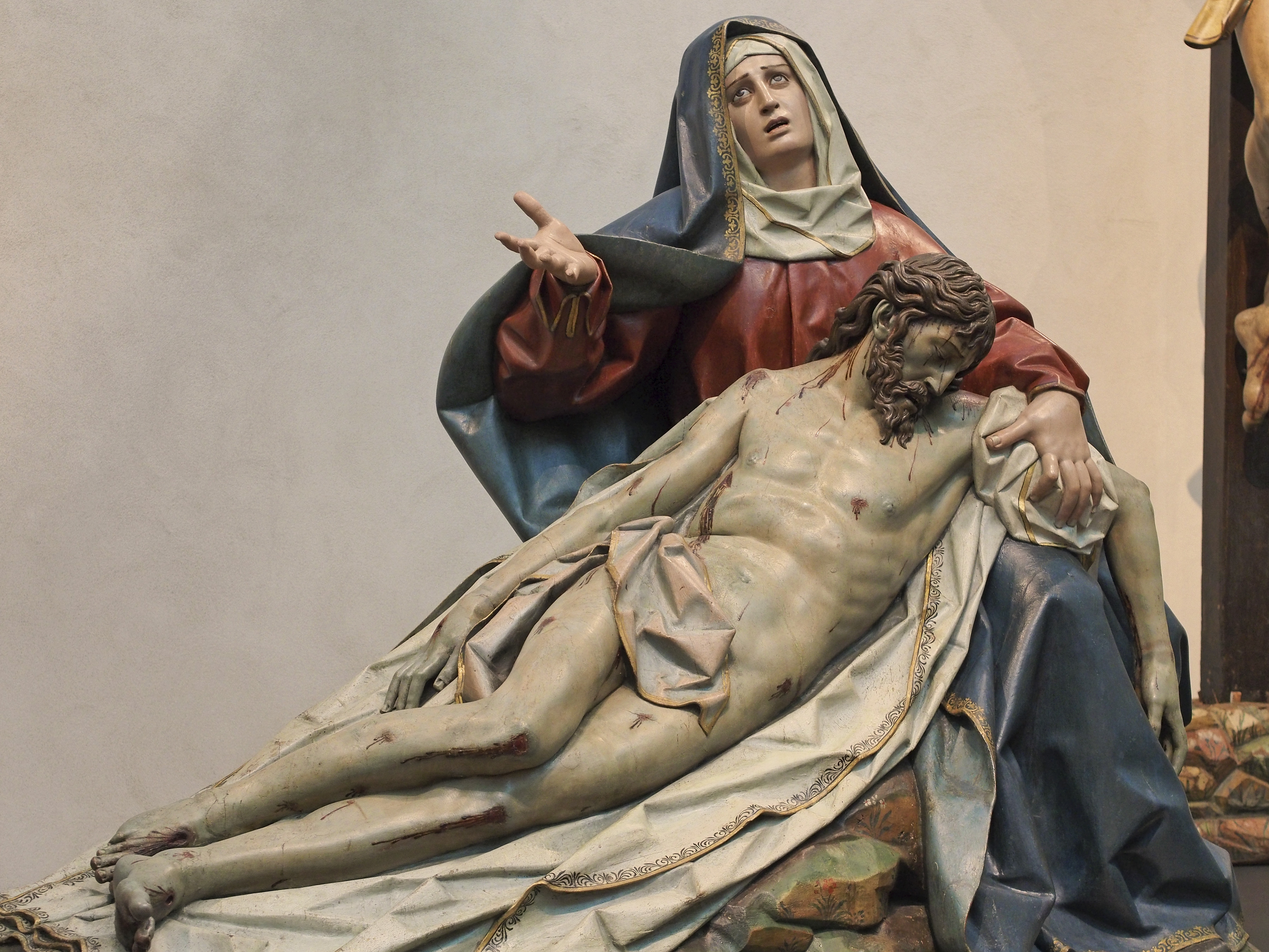 Sexta Angustia, 1616-1617, Gregorio Fernández (1576-1636). Museo Nacional de Escultura, Valladolid.